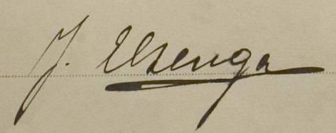 Подпись Яна Элзенги